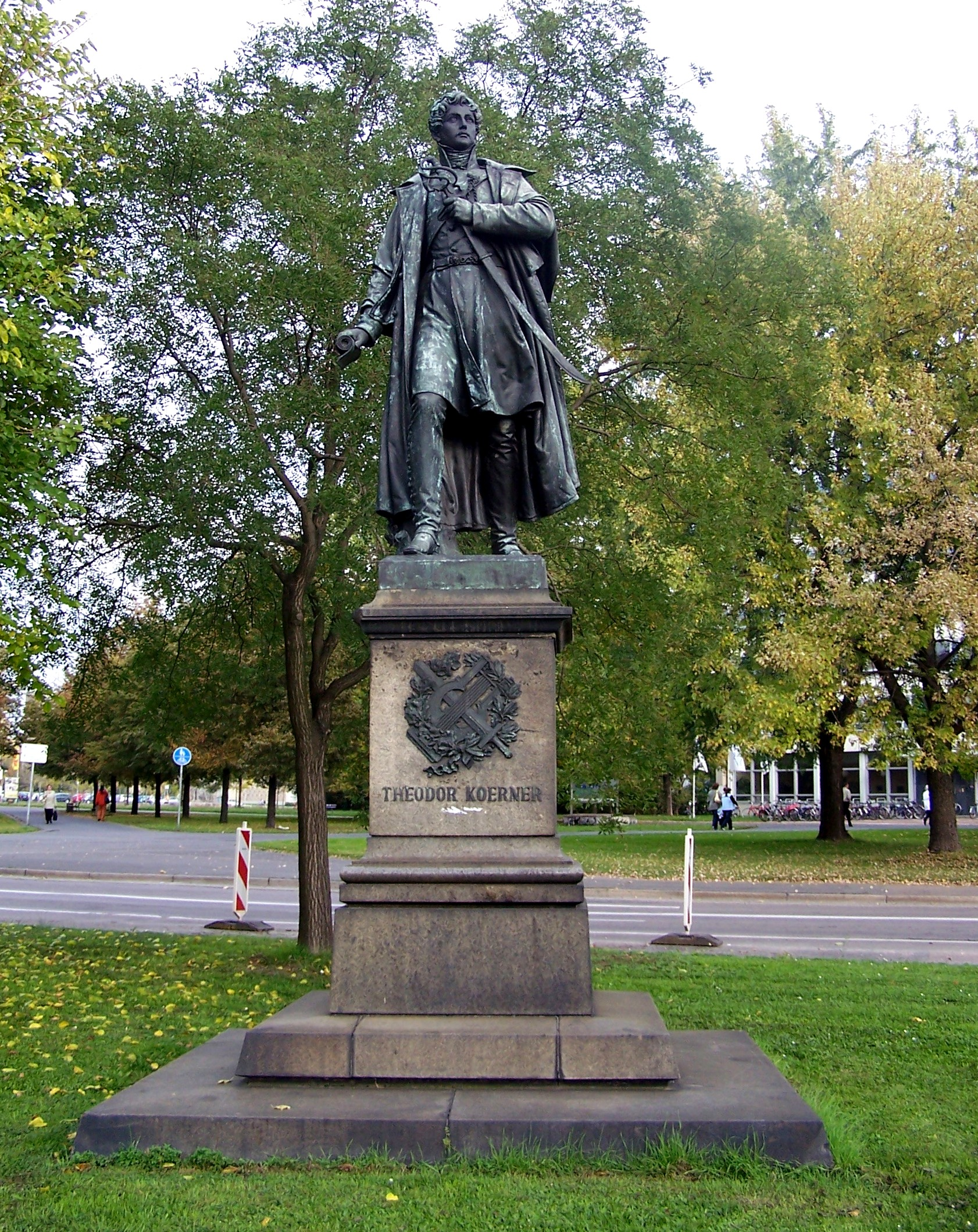 Theodor-Körner-Denkmal von Ernst Hähnel in Dresden, Georgplatz